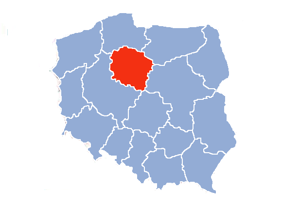 The map of Kujawsko-Pomorskie Voivodship